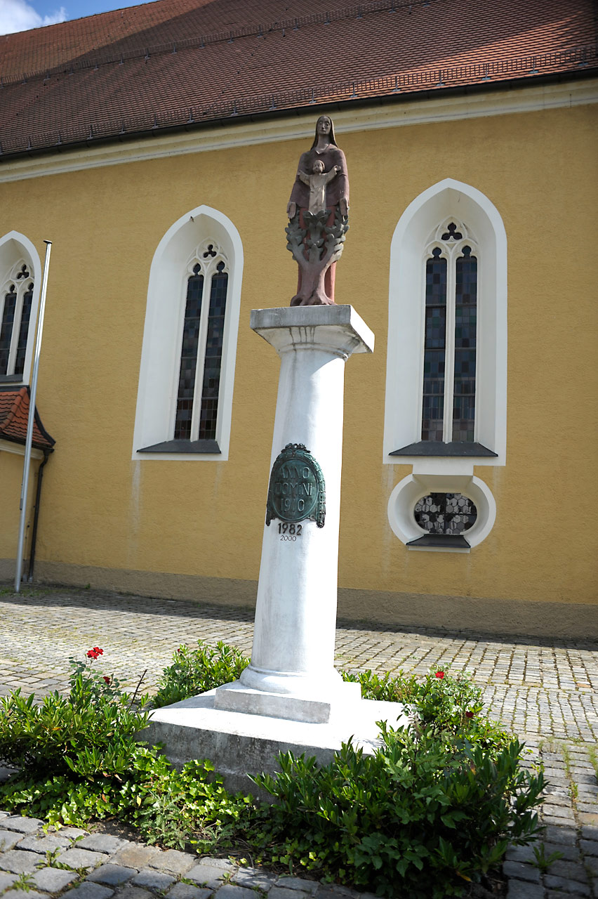 Mariensäule Hirschau Frontansicht